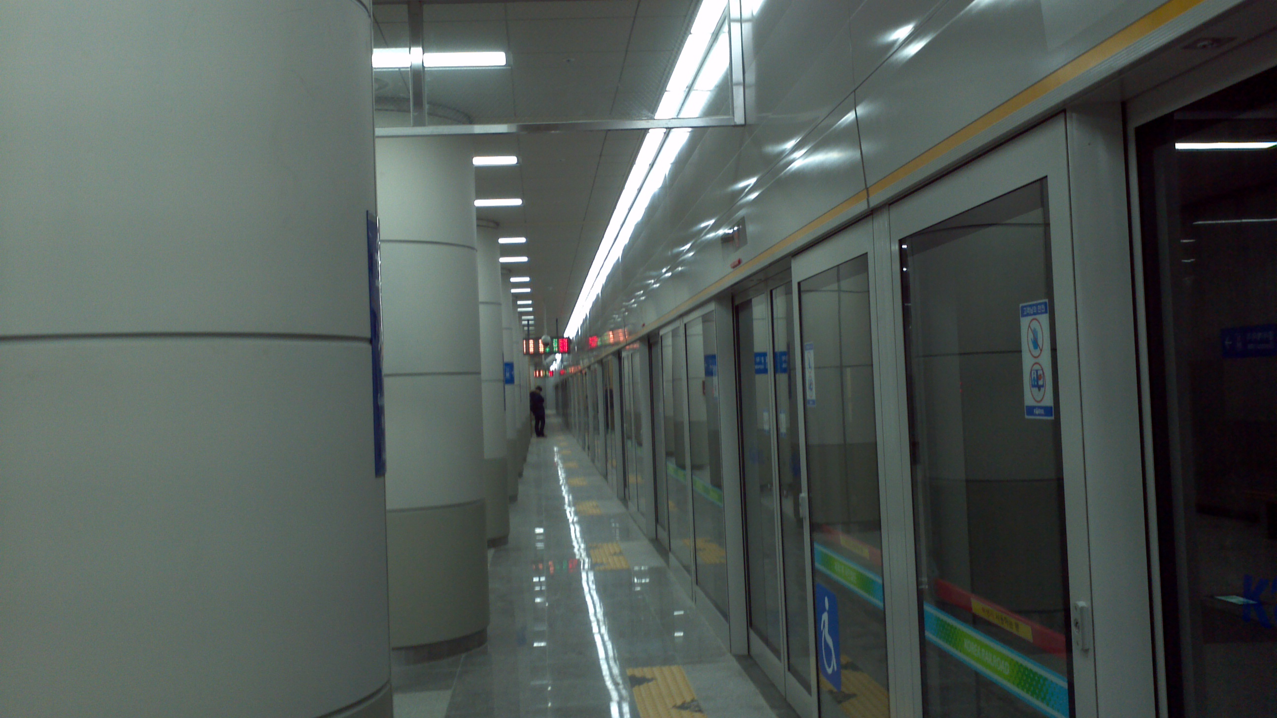 구성역 1번 승강장